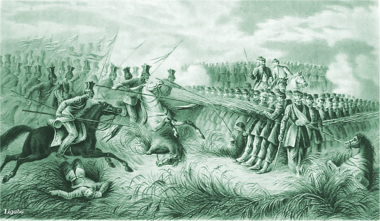 Battaglia di Solferino e San Martino, il 24 giugno 1859, ore 10 a.m. circa. L'11º Battaglione di Cacciatori a piedi della Brigata Gault (2ª Divisione Decaen, II Corpo d'Armata Mac-Mahon), disposto a difesa in quadrati, resiste a tre cariche consecutive dei cavalleggeri Ulani, nel Campo di Medole.